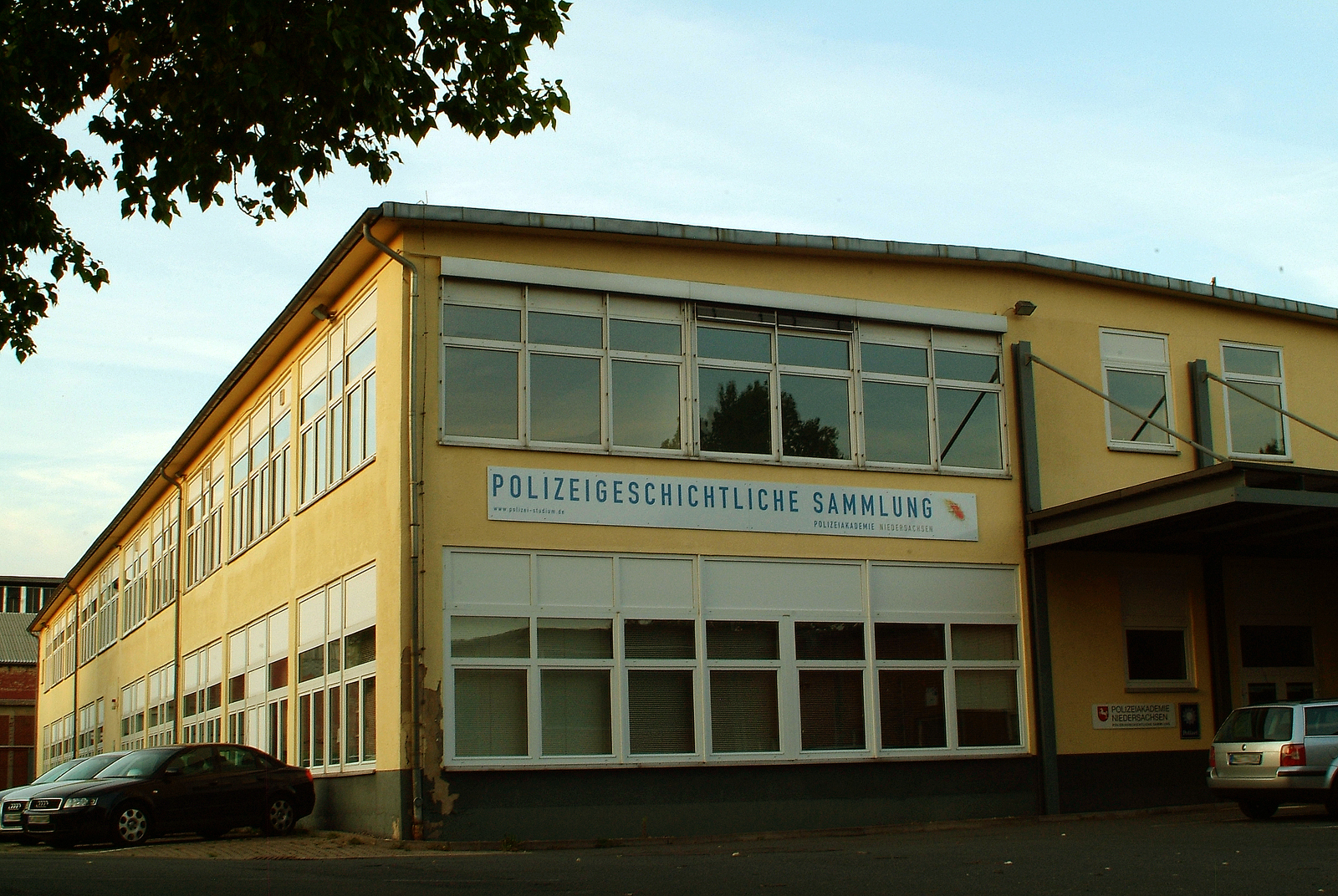 Das Gebäude der Polizeigeschichtlichen Sammlung dient mit seinen Exponaten der Polizeiakademie Niedersachsen und kann während der Öffnungszeiten auch von Außenstehenden besucht werden.